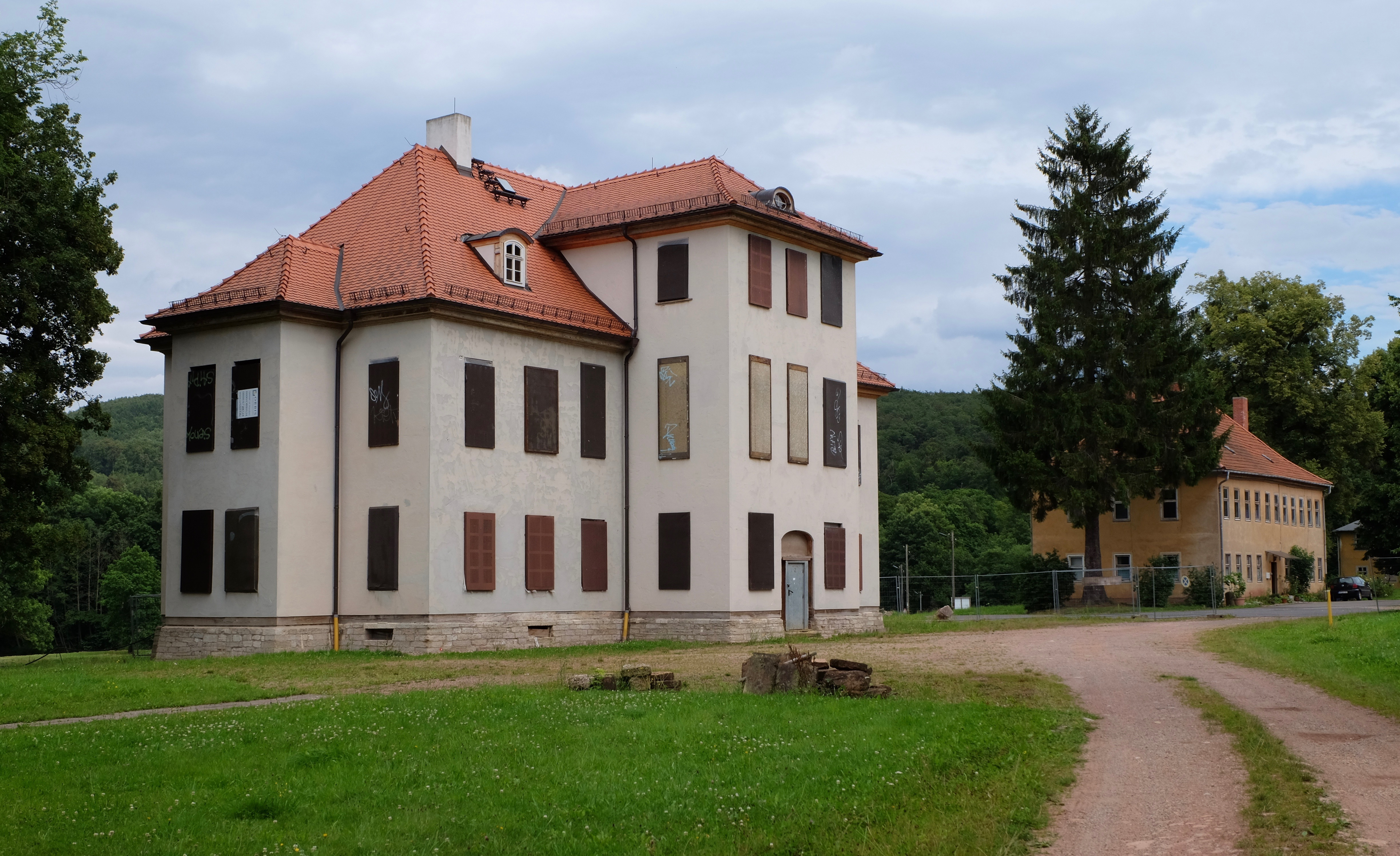 Blick auf das Corps de Logis des Alten Schlosses Wilhelmsthal